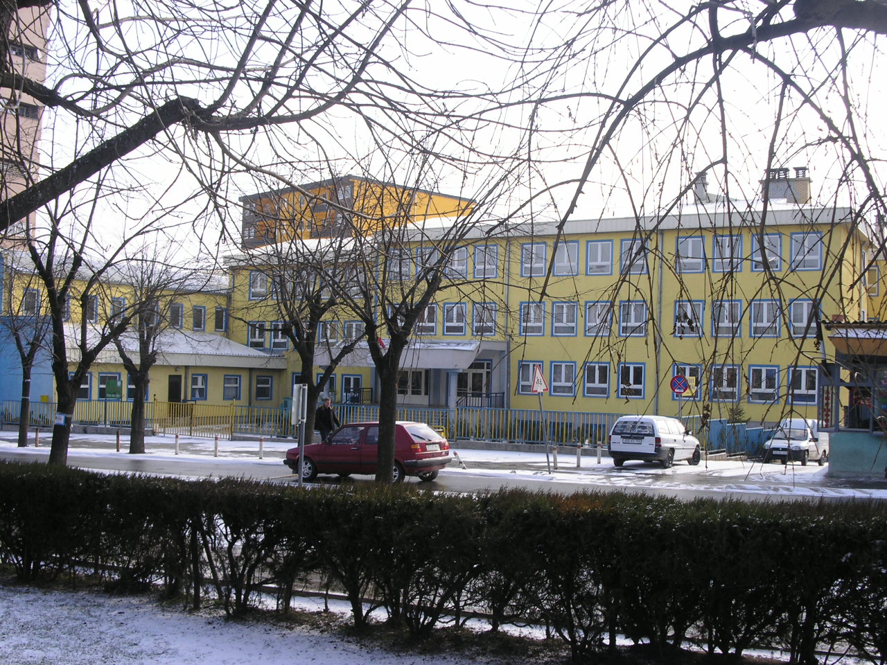 Shkolla Fillore "Thimi Mitko" Gjilan,e ndertuar pas luftes.